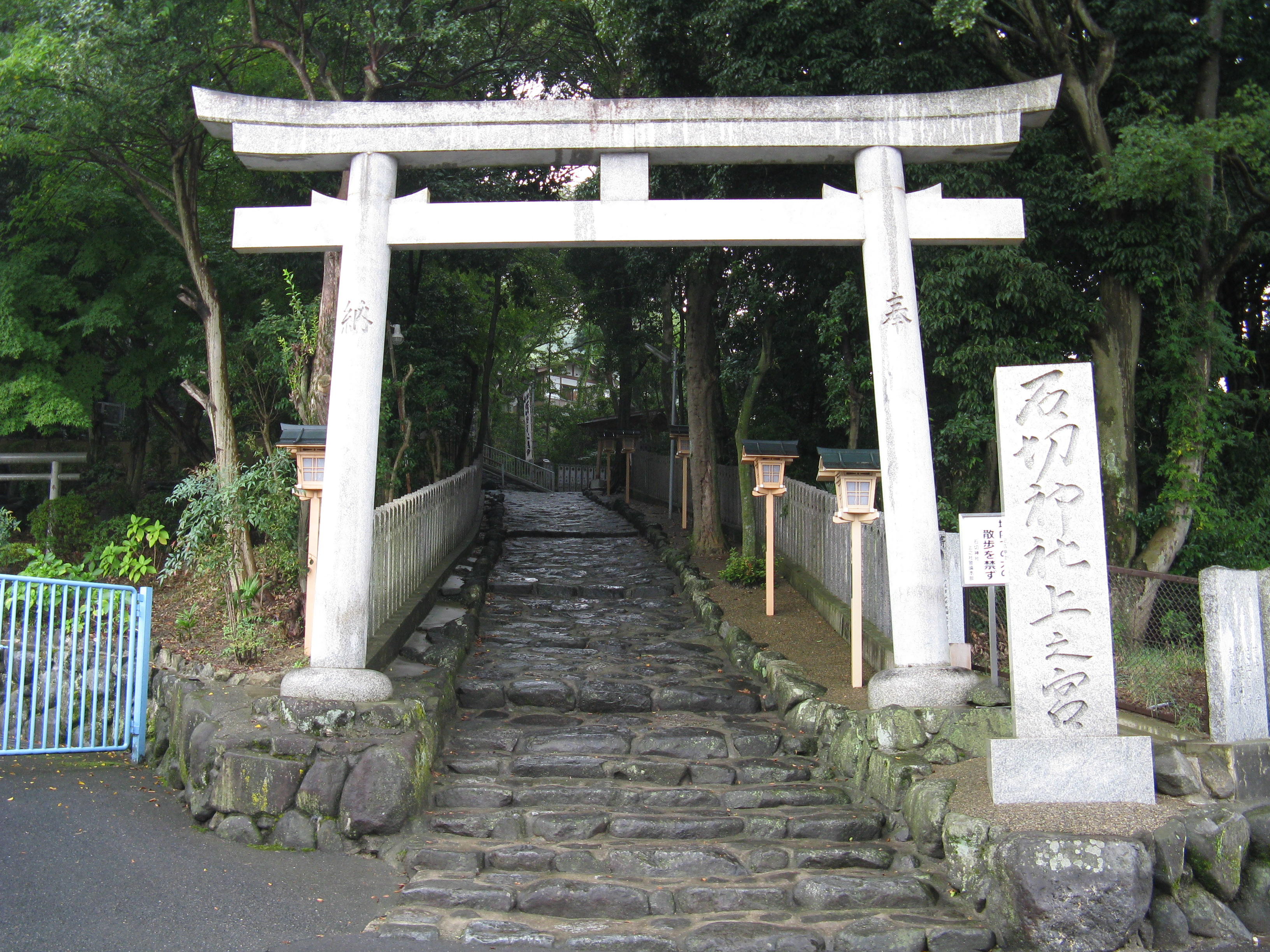 石切剣箭神社 上之宮参道